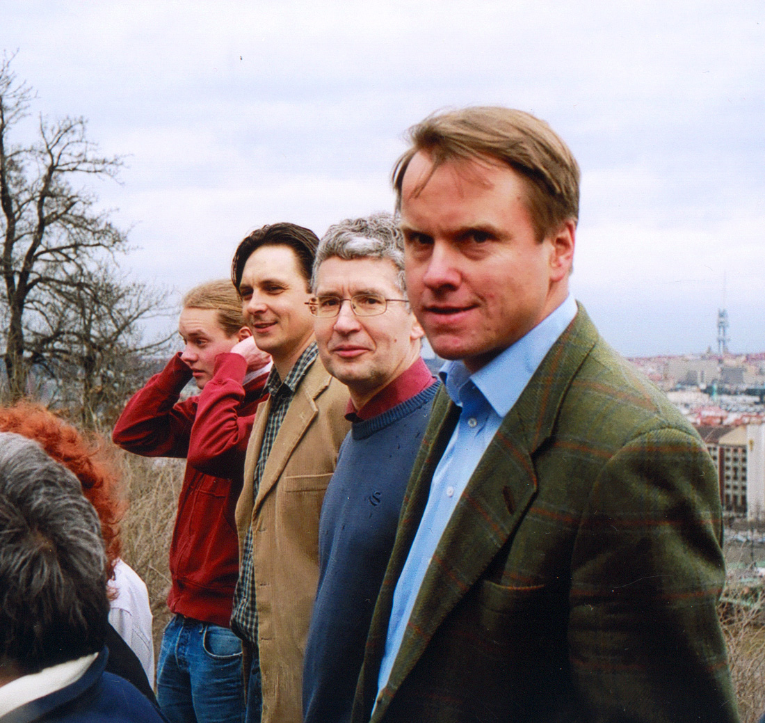 Martin Bursík a několik dalších kandidátů SZ ve parlamentních volbách v roce 2006. Za Bursíkem zleva odzadu: Josef Šmída (? 8. na pražské kandidátce SZ do voleb 2006), Tomáš Bräuner (23., dlouholetý zastupitel SZ na Praze 15), Jiří Bendl (13.)